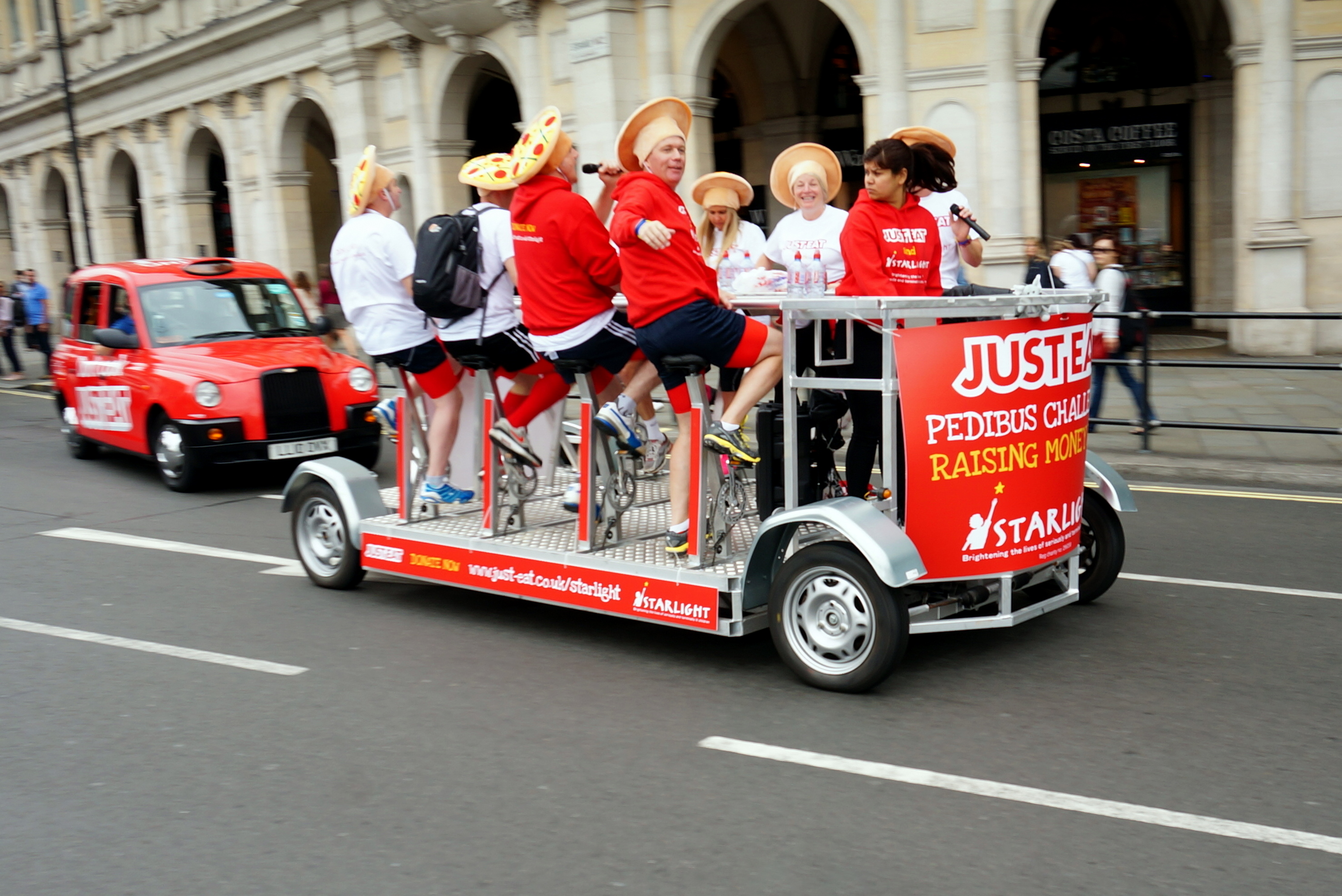 Londyn. Kwadrycykl, rower wieloosobowy przeznaczony do wycieczek, akcji reklamowych, ekstrawaganckich imprez. Jednocześnie może przewieźć 12 osób z których 8 pedałuje.